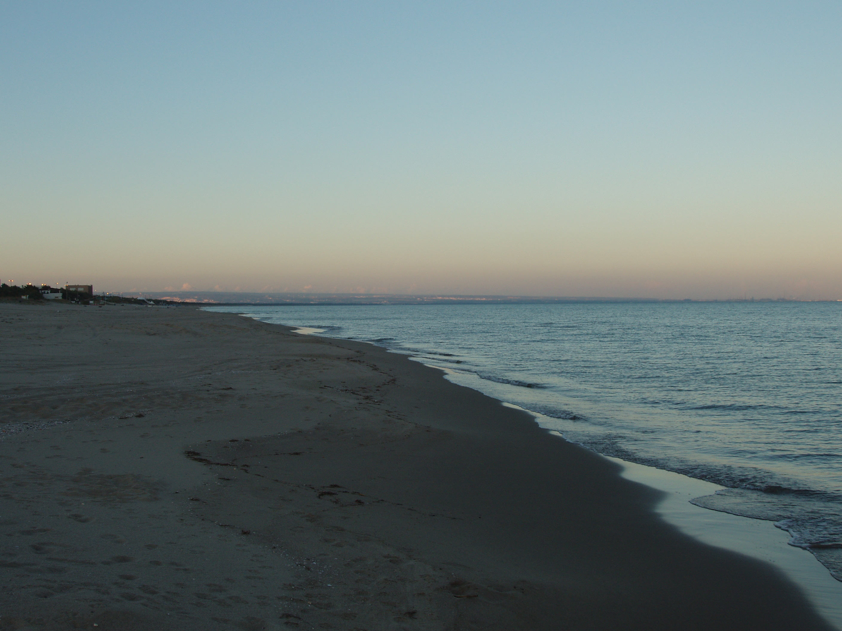 Castellaneta Marina - Sea